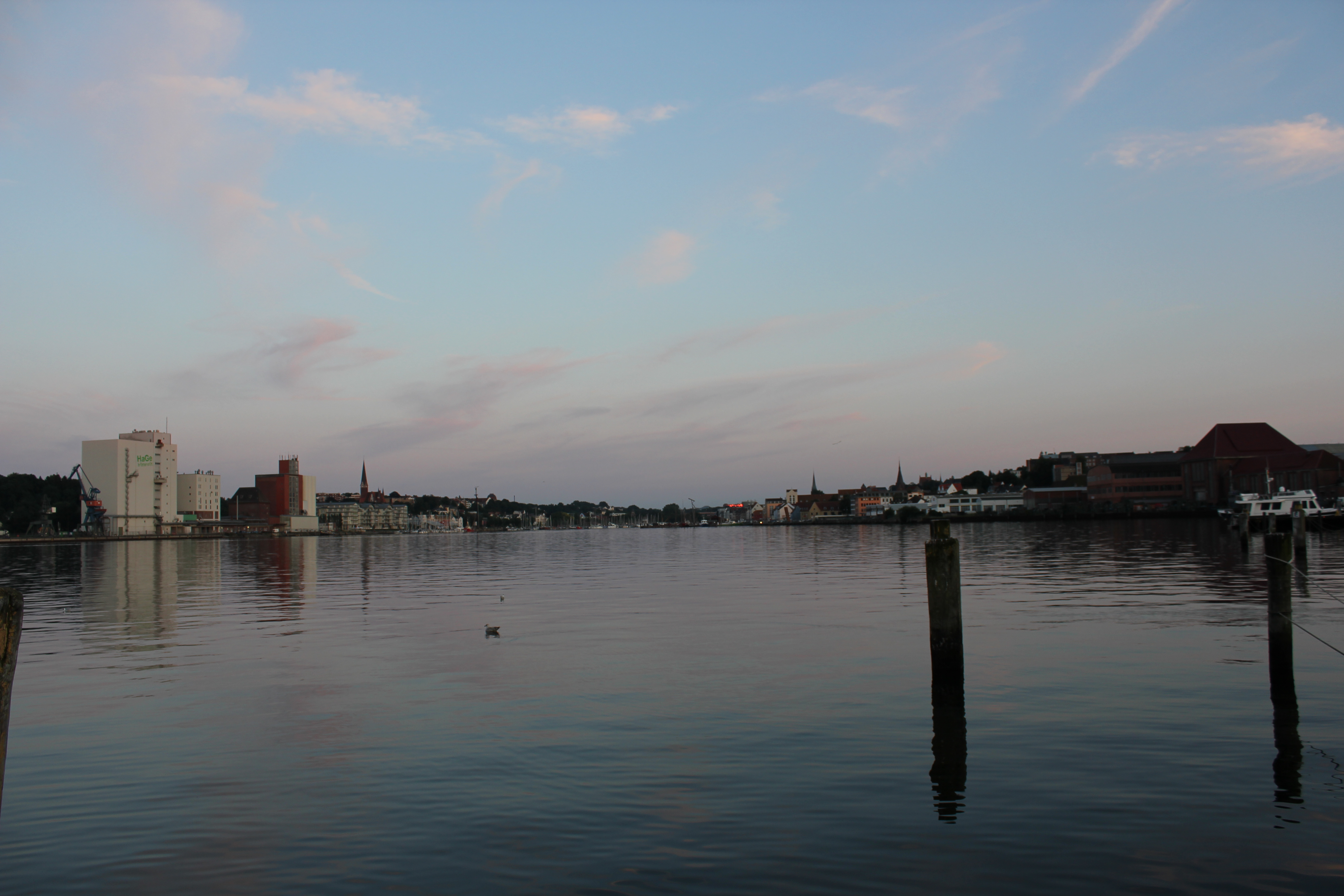 Flensburger Hafen (Gesamtbild) zum Abend hin aufgenommen, auf der Höhe von Galwik